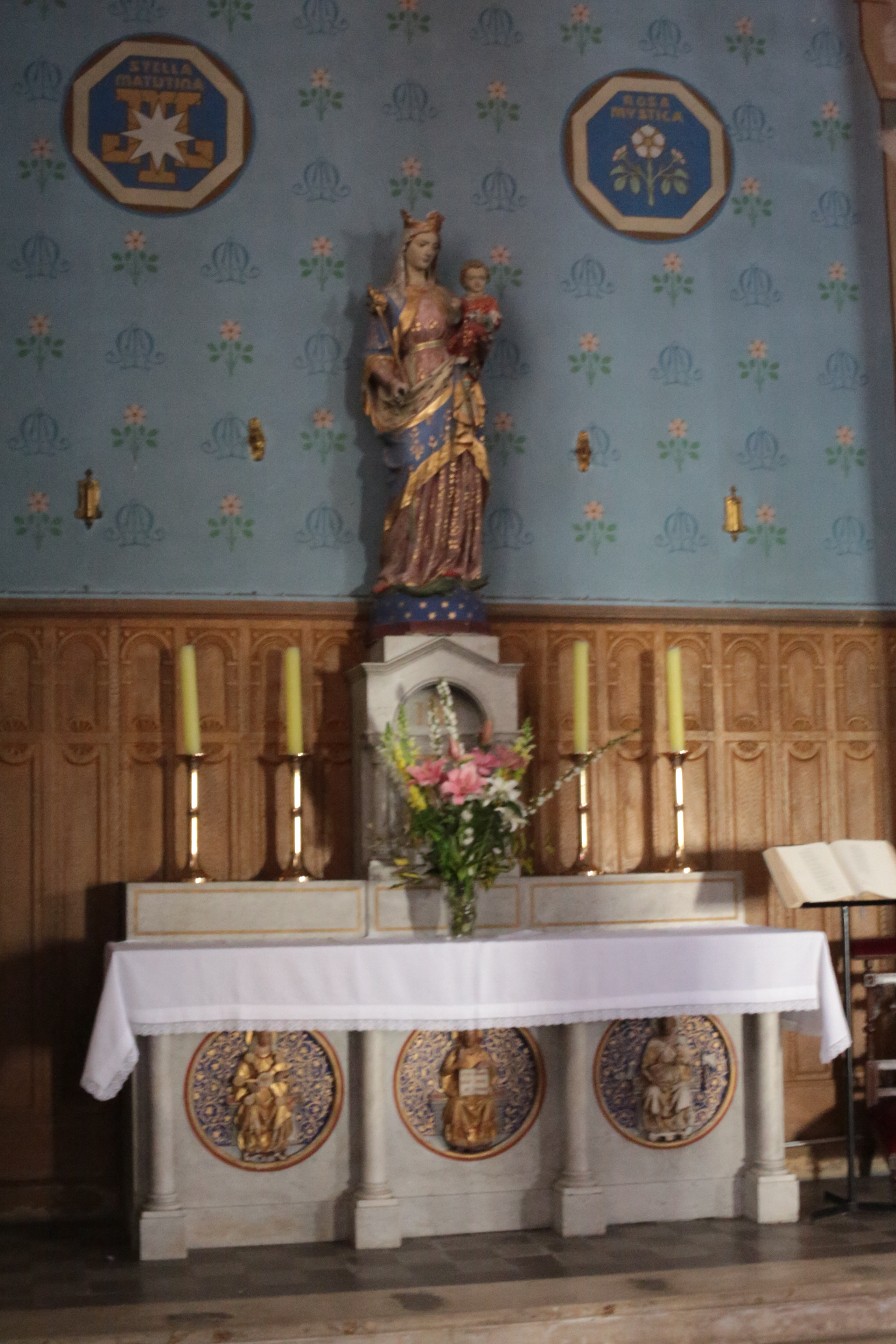 Autel de la Vierge de l'église de Brocas